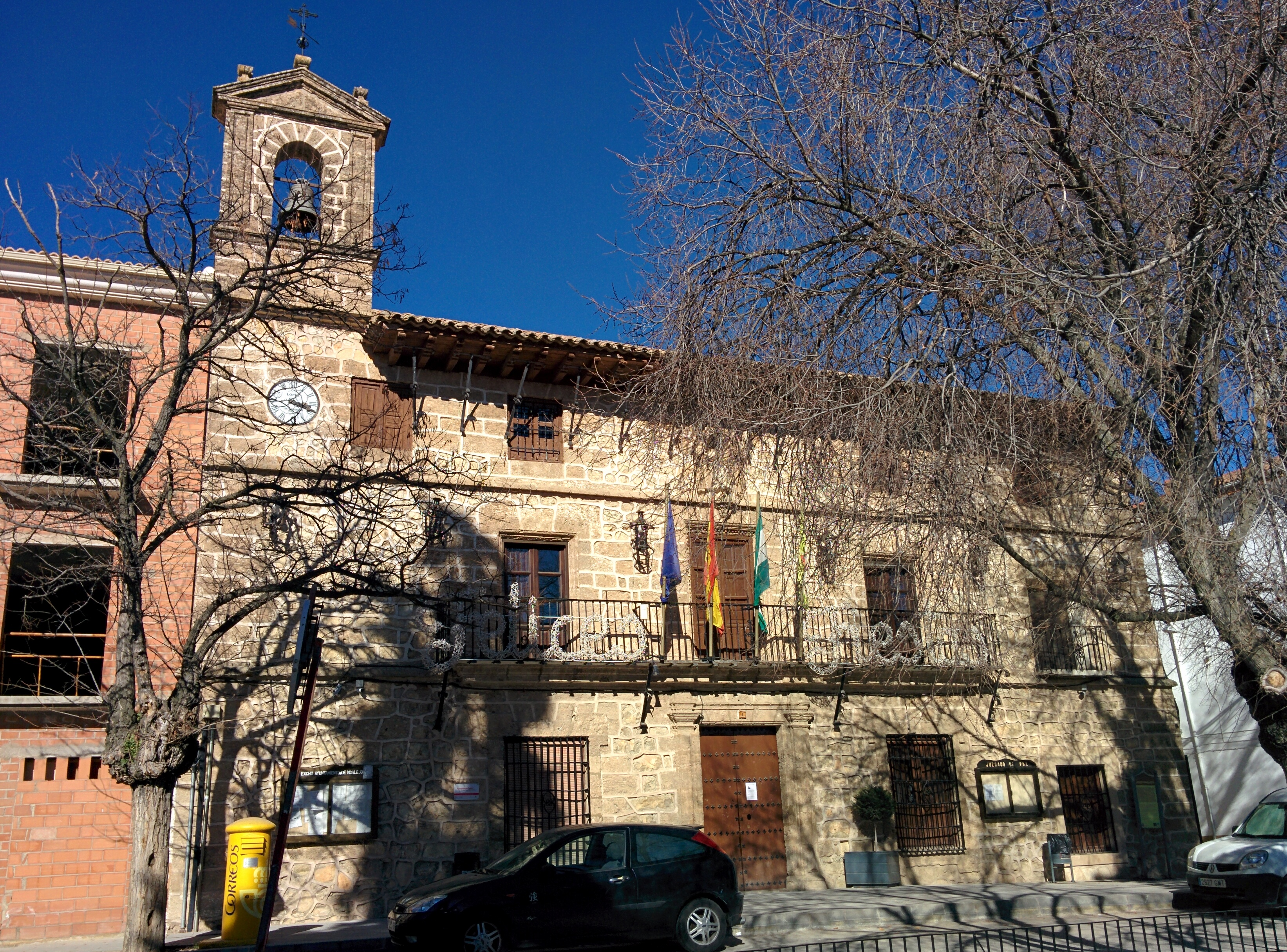 Casa consistorial de Noalejo (Jaén, España).